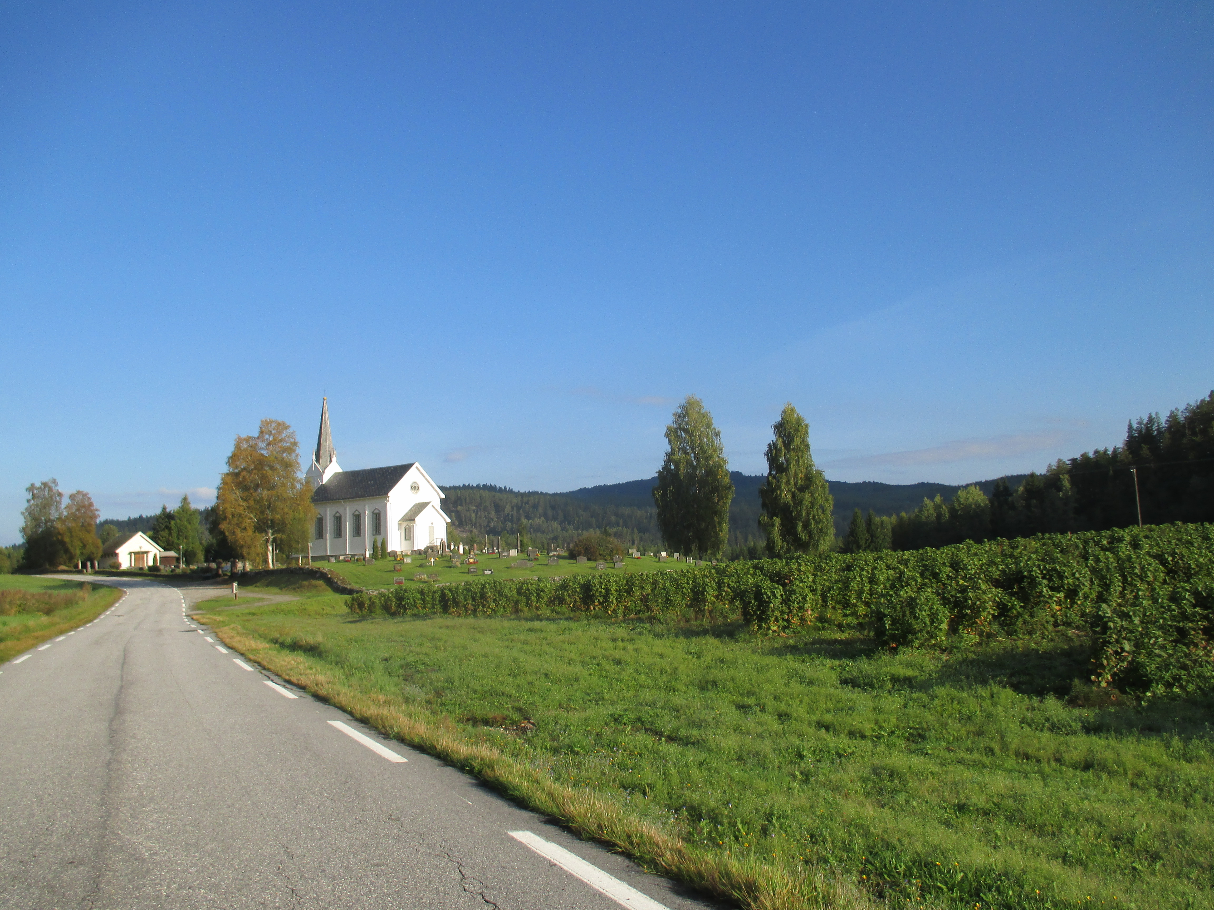 Fylkesvei 601 går forbi Lisleherad kirke.